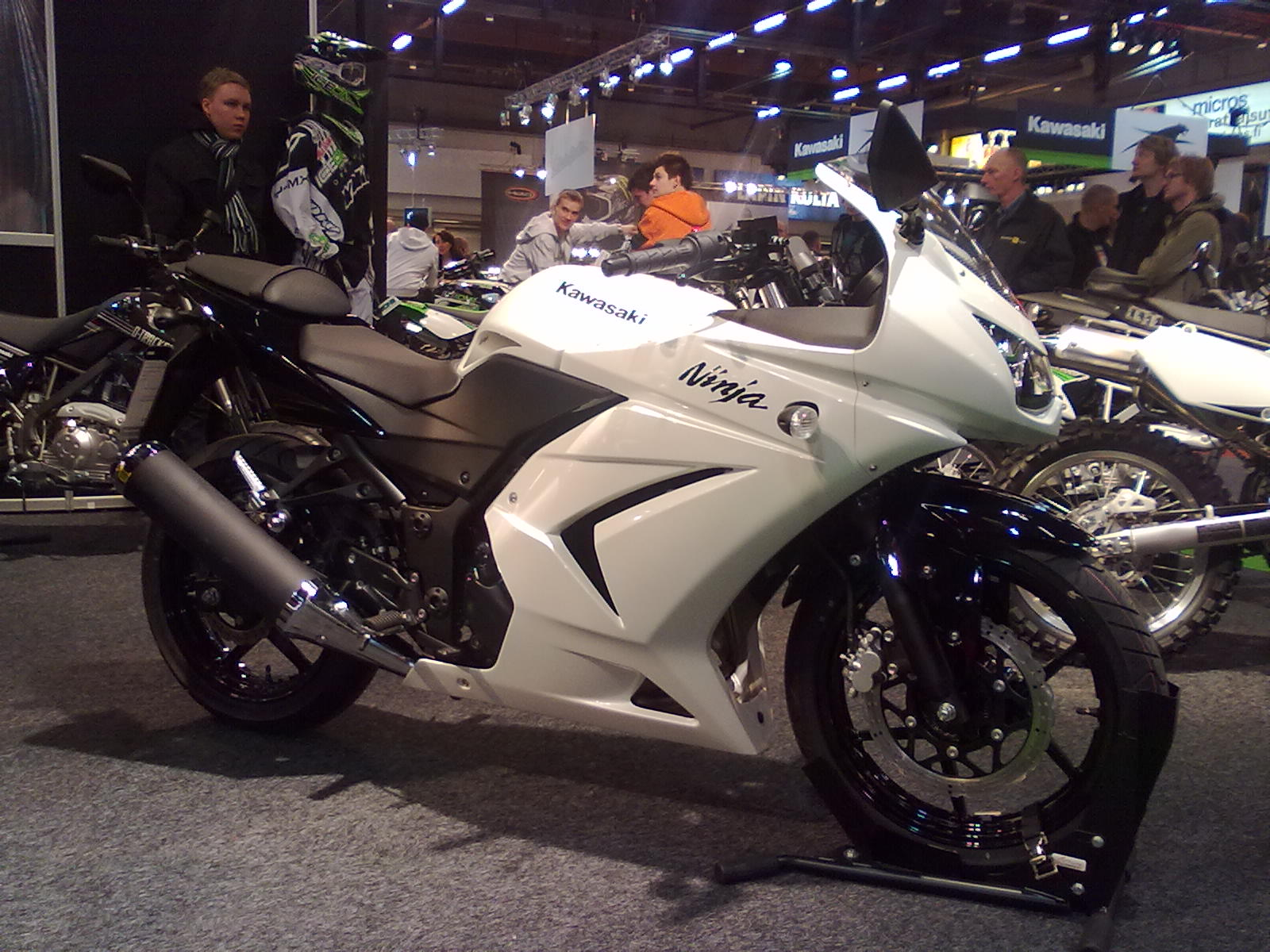 Kuva otettu Helsingin Messukeskuksessa.